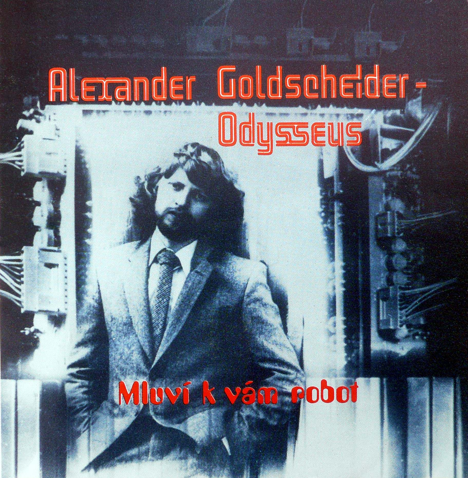 Foto a popis pro použití na SP Pantonu